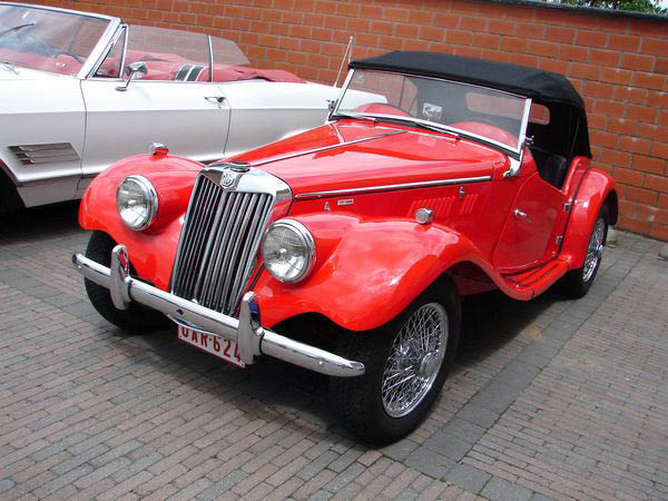 MG TF 1954